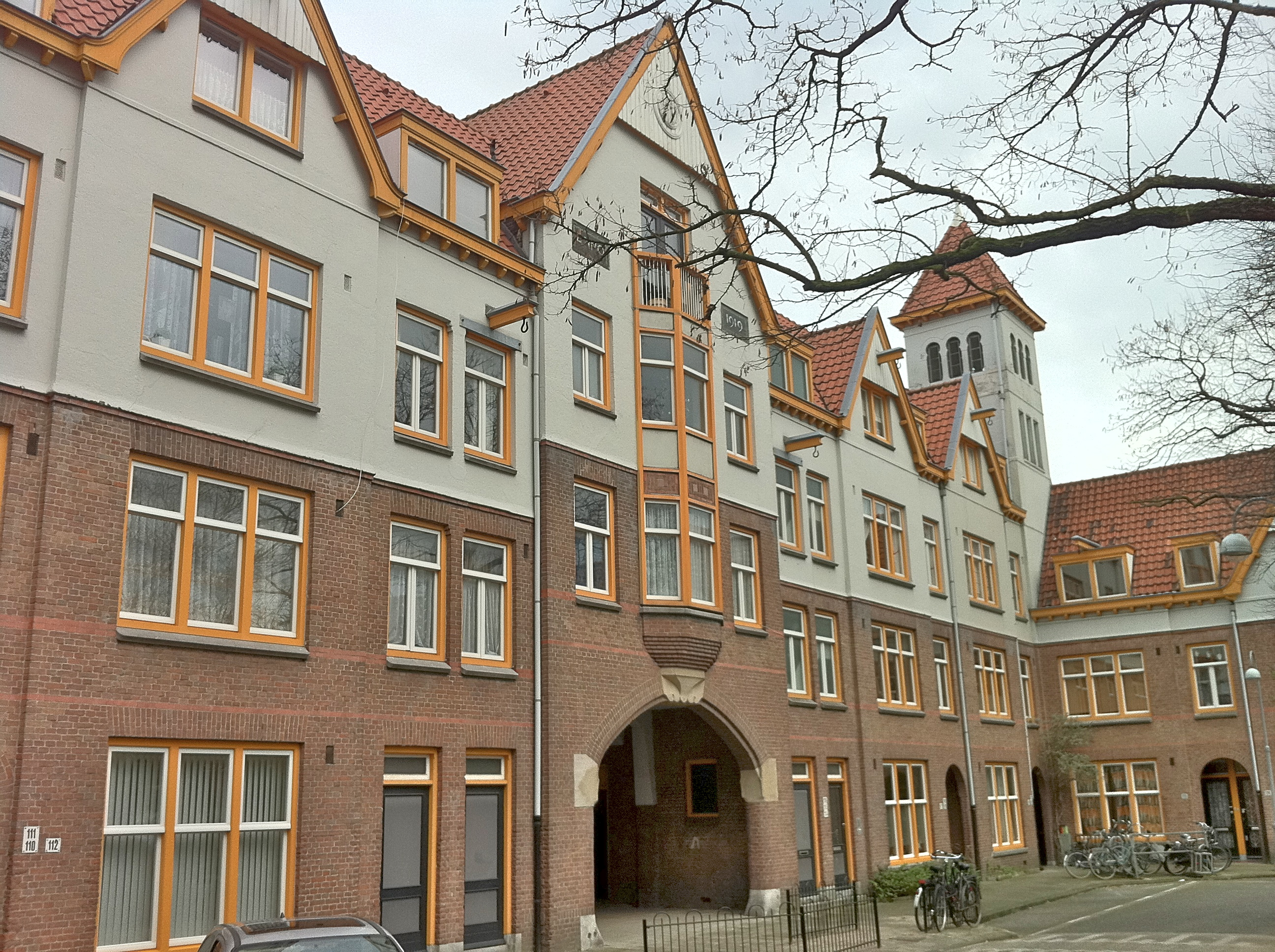 Amsterdam, Spaarndammerbuurt. Deel van Zaanhof dat is gebouwd door woningbouwvereniging Het Westen. Architect Herman Walenkamp, ontworpen in 1915-1916, voltooid 1920.